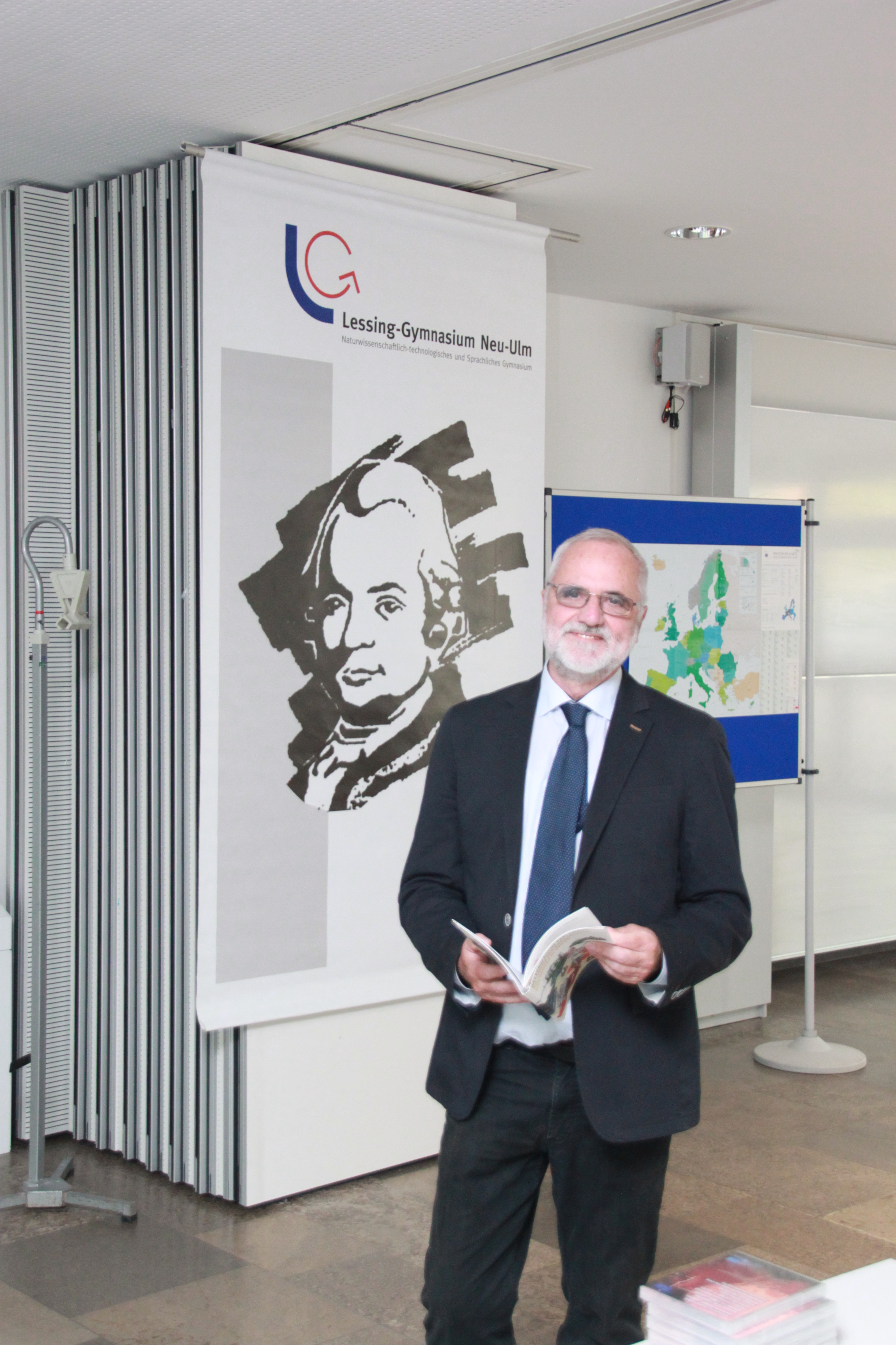 Prof. Dr. Gebhardt am 04.05.2017 anlässlich eines Vortrags beim LessingForum in Ulm